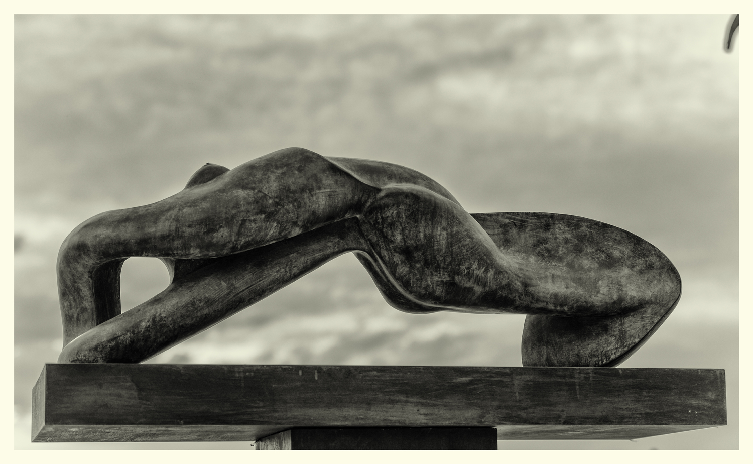 Escultura de Mustafa Arruf, ubicada en el Paseo Marítimo de la ciudad española de Melilla.